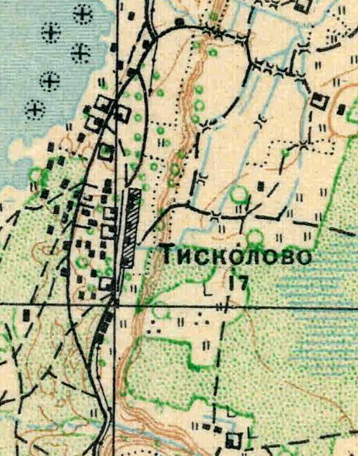 Топографическая карта Ленинградской области, квадрат О-35-9-В-в (Тисколово), деревня Тисколово